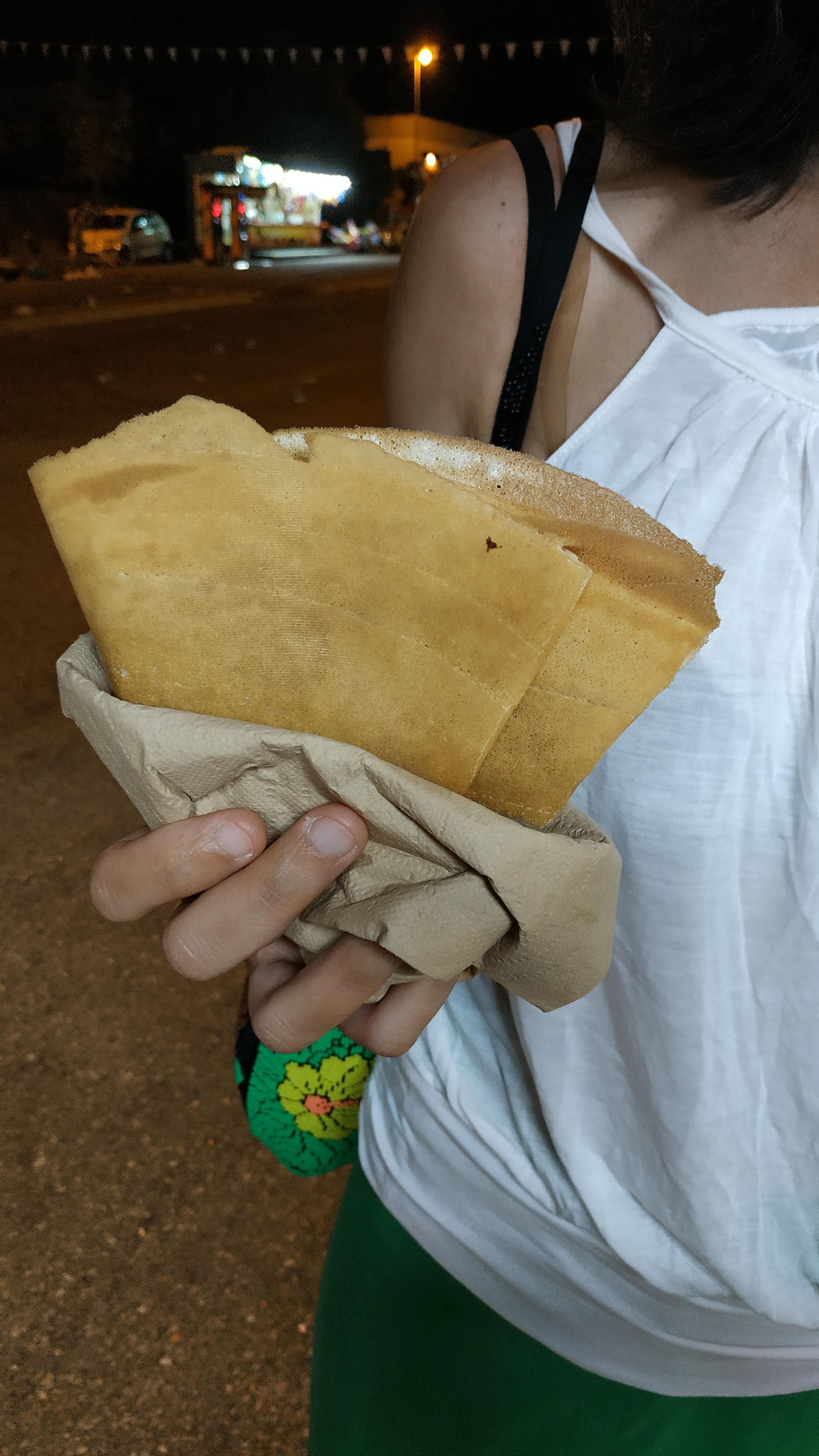 Crepe salentina a beer e friends a Vernole